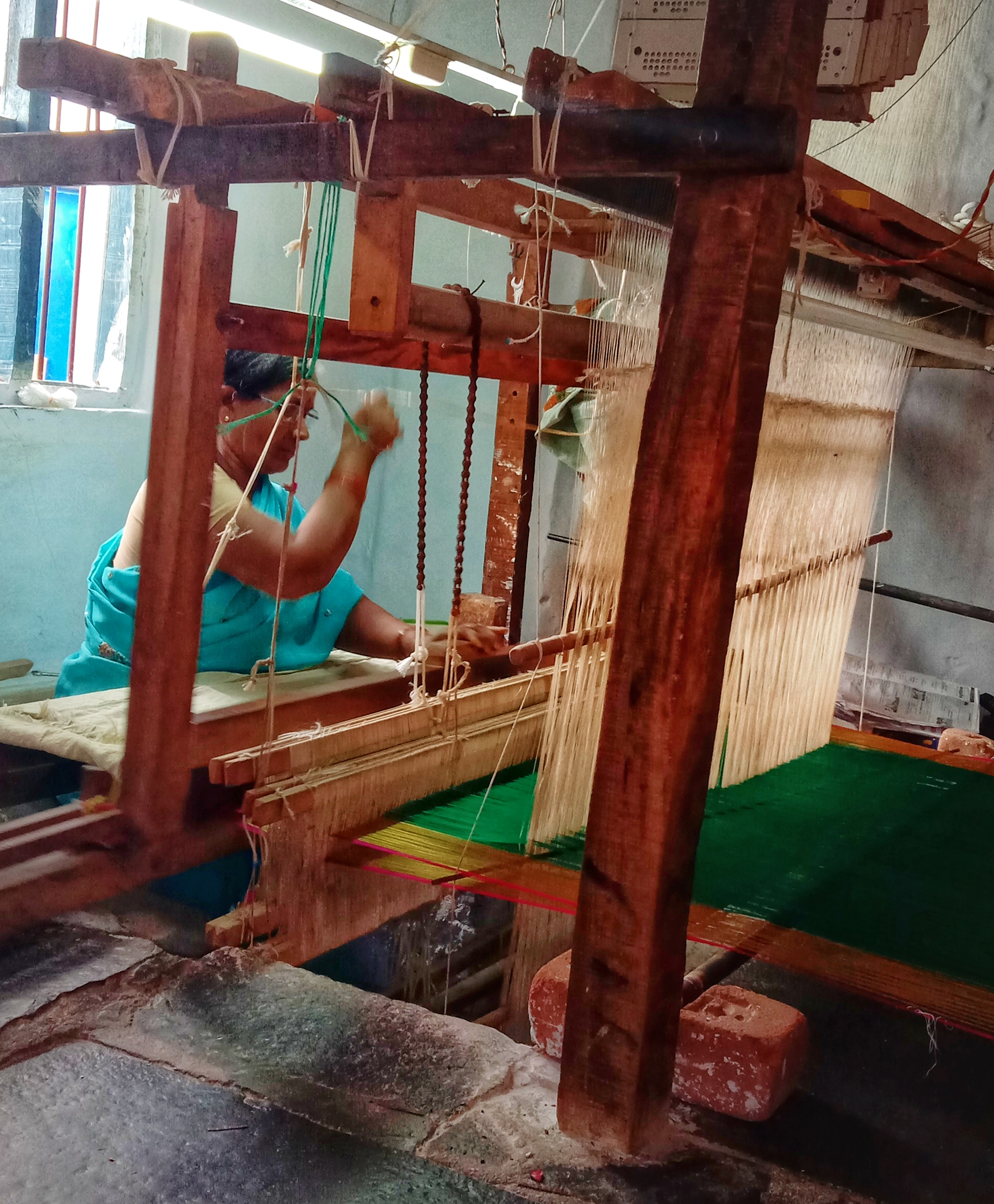 ధర్మవరం లో మగ్గం నేస్తున్న మహిళ.